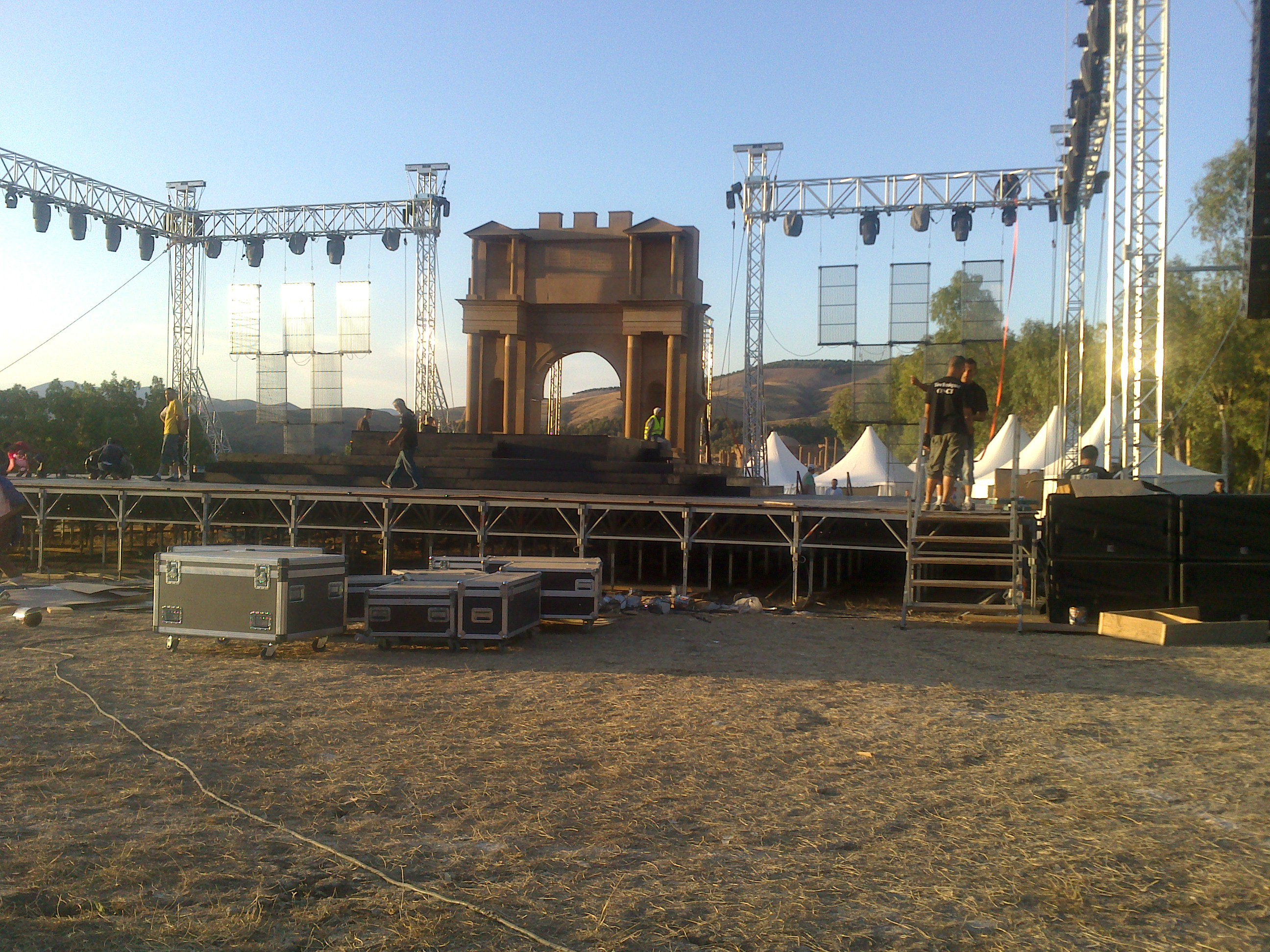 مهرجان جميلة العربي يقام كل سنة في مدينة جميلة الاثرية